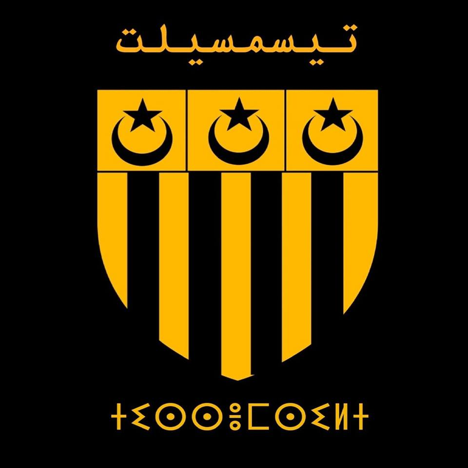 armoiries / blason de Tissemsilt